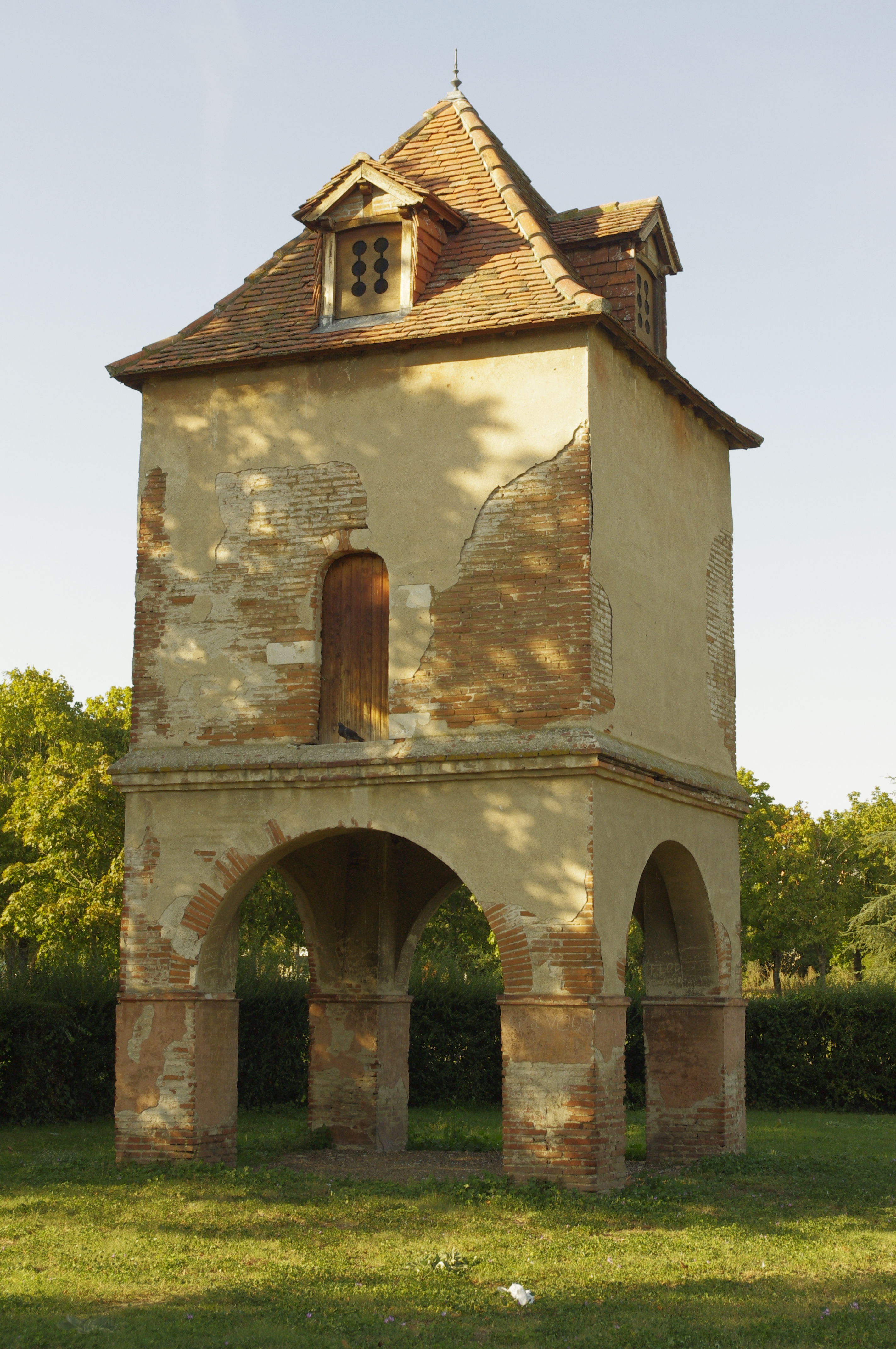 Pigeonnier du château du Mirail, Toulouse